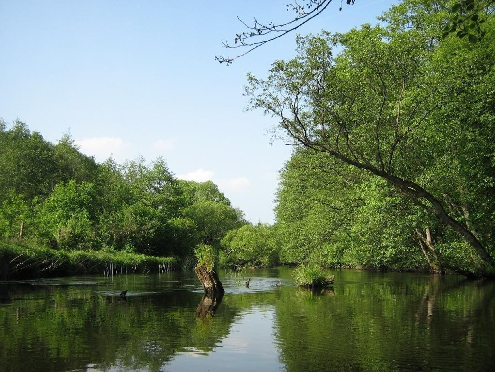 die Rega, ein Fluss in Hinterpommern, Woiwodschaft Westpommern (Nordwestpolen).